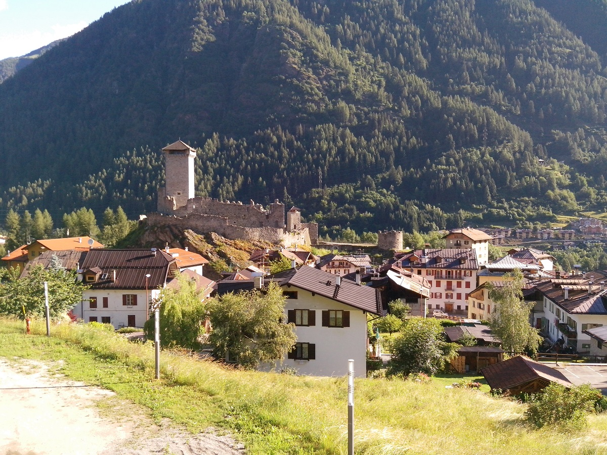 Veduta del Castello e del Borgo di Ossana.